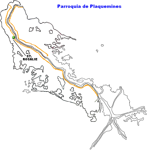 St. Rosalie, Louisiana.